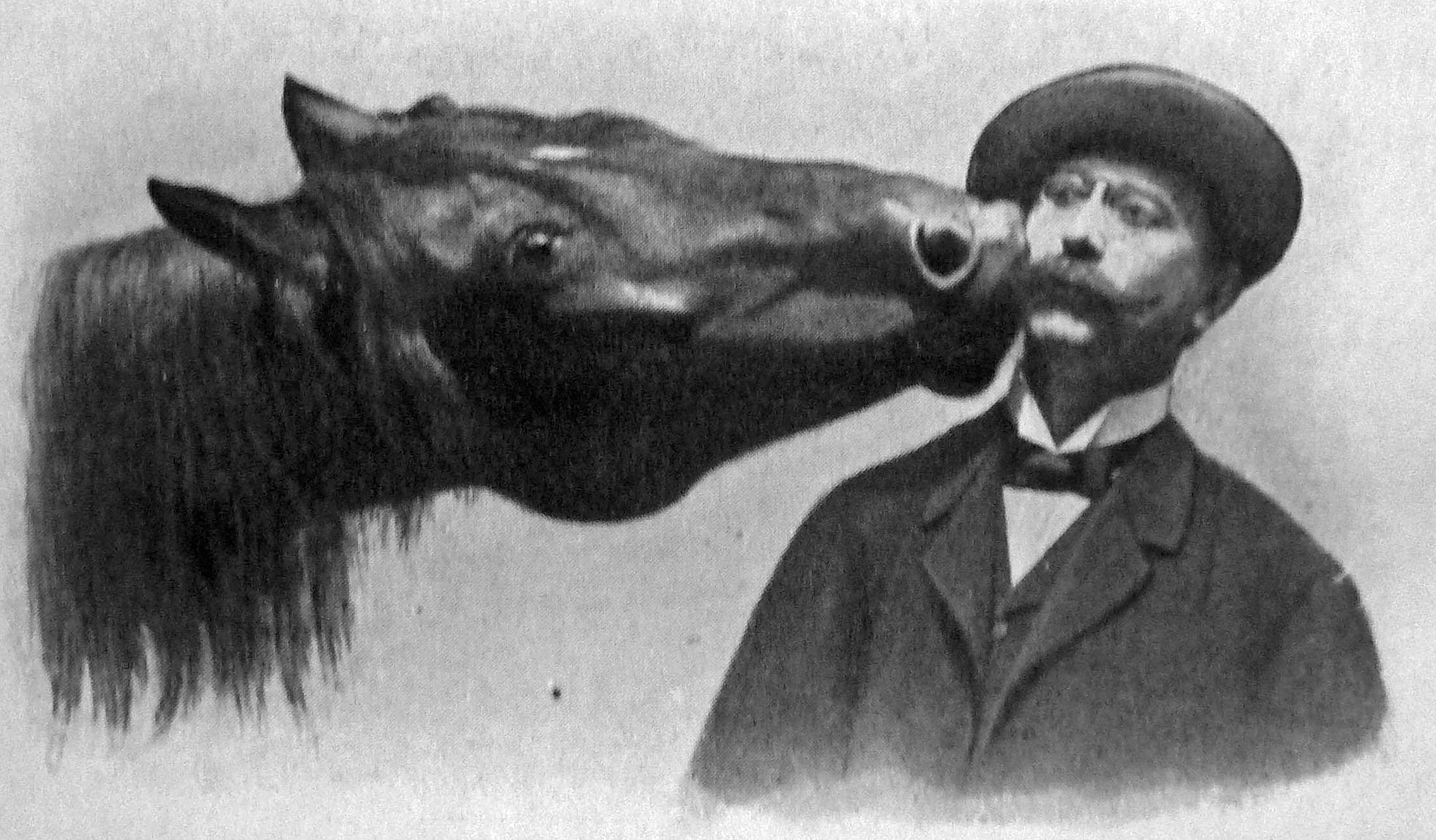 Der kluge Hans und Karl Krall